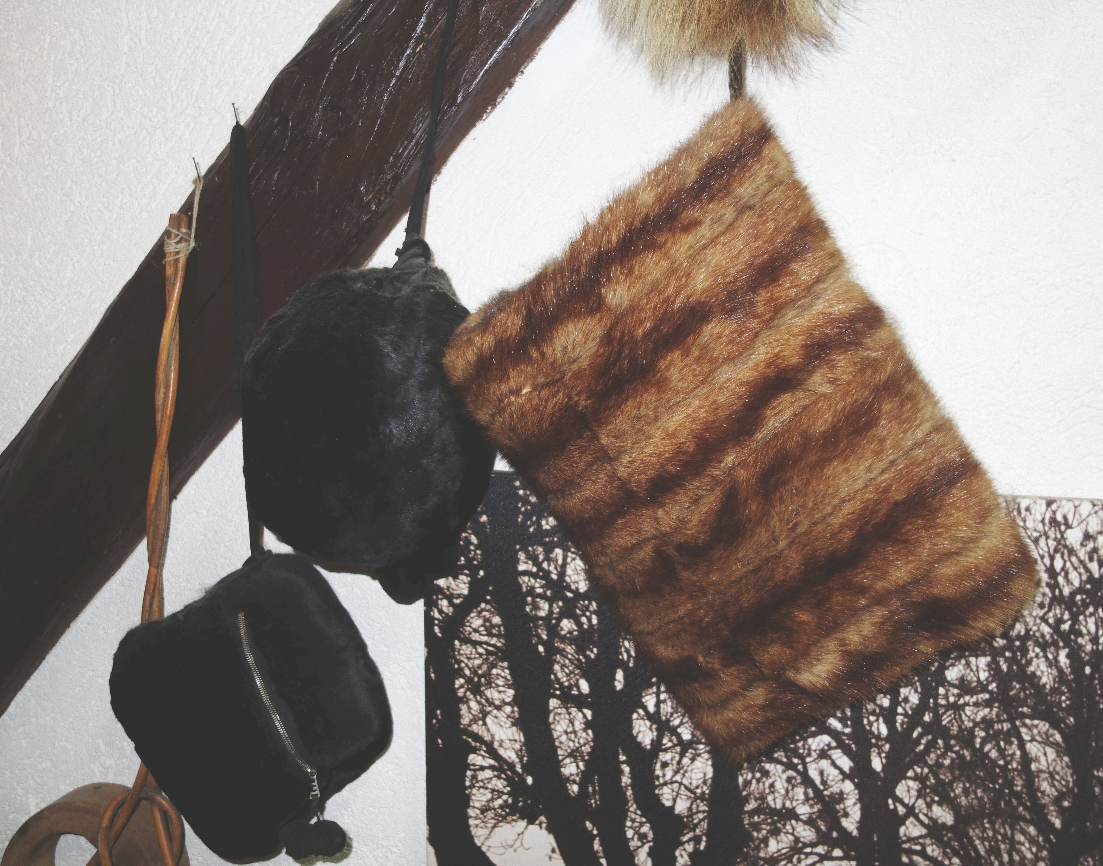 Alte Pelzmuffs. Sammlung Udo Meinelt & Söhne, Rötha.